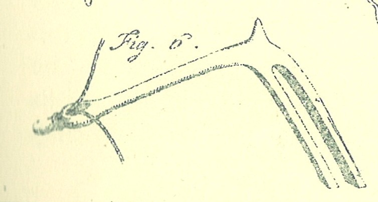 Årskjøne, reiskap til å halde asymmetrisk råsegl ut frå båten